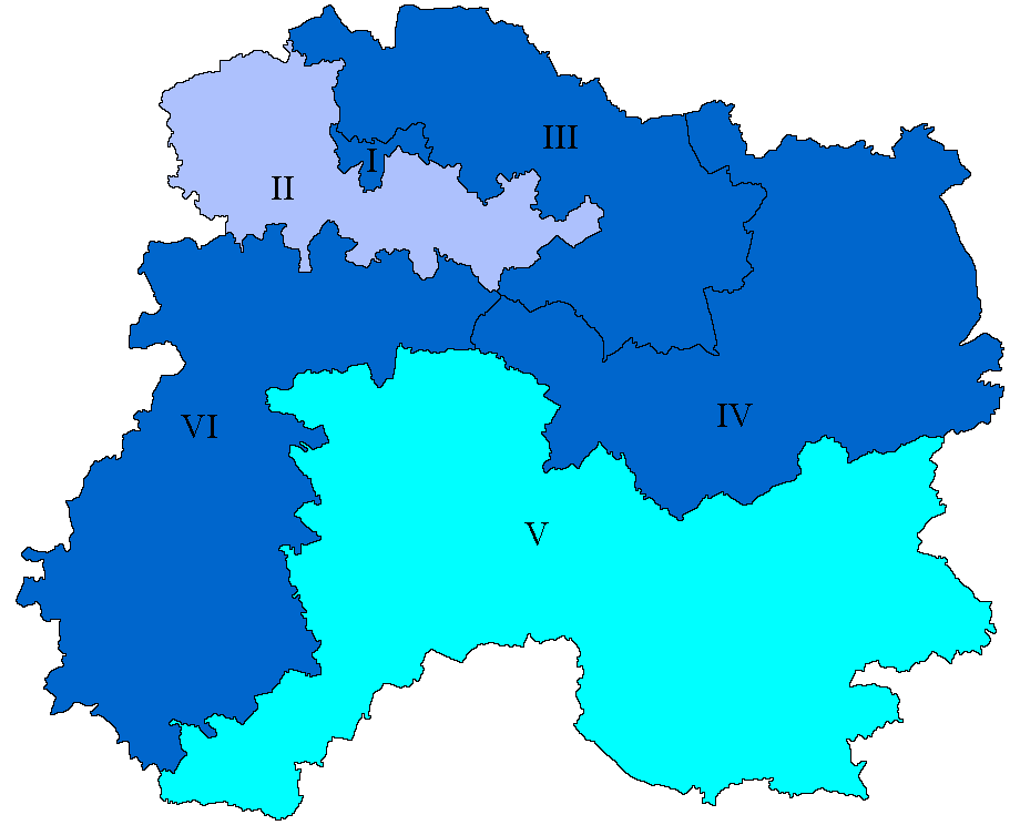 Députés de la Marne en 2002